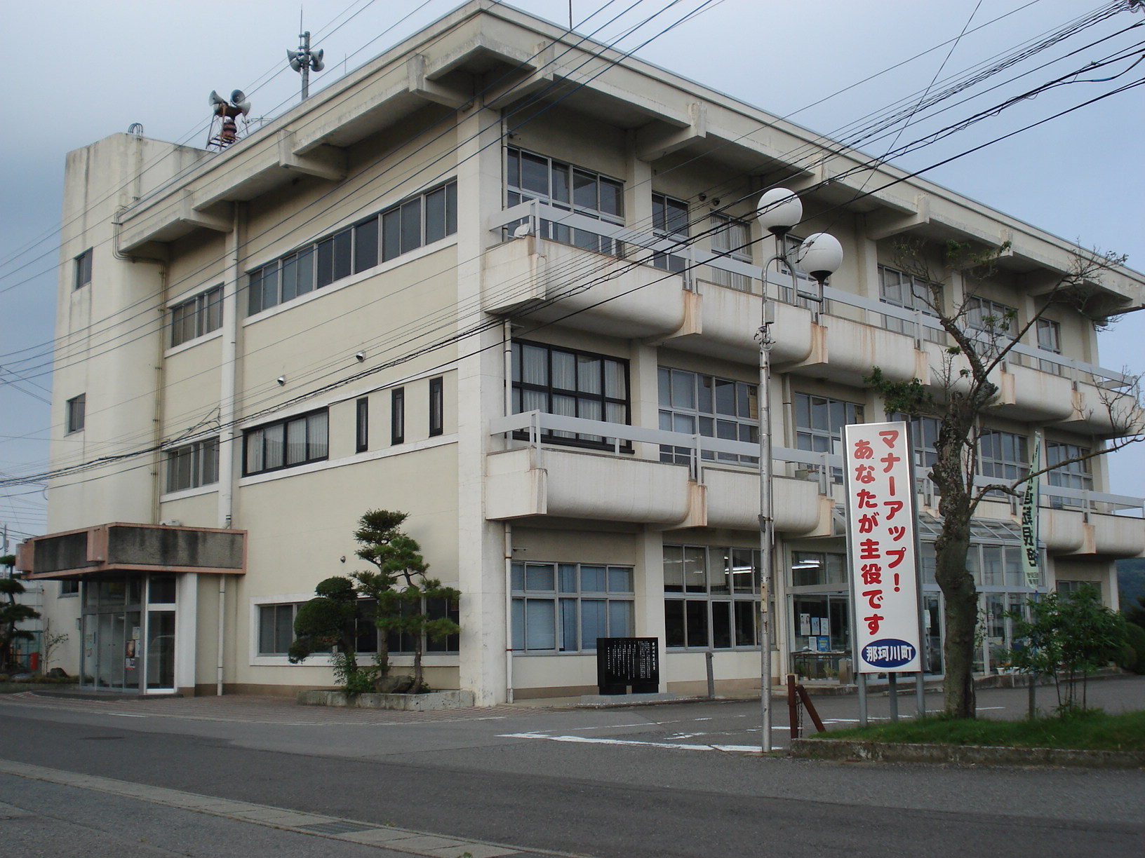 栃木県那珂川町役場小川庁舎